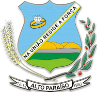 Brasão de Alto Paraíso de Goiás, Brasil.